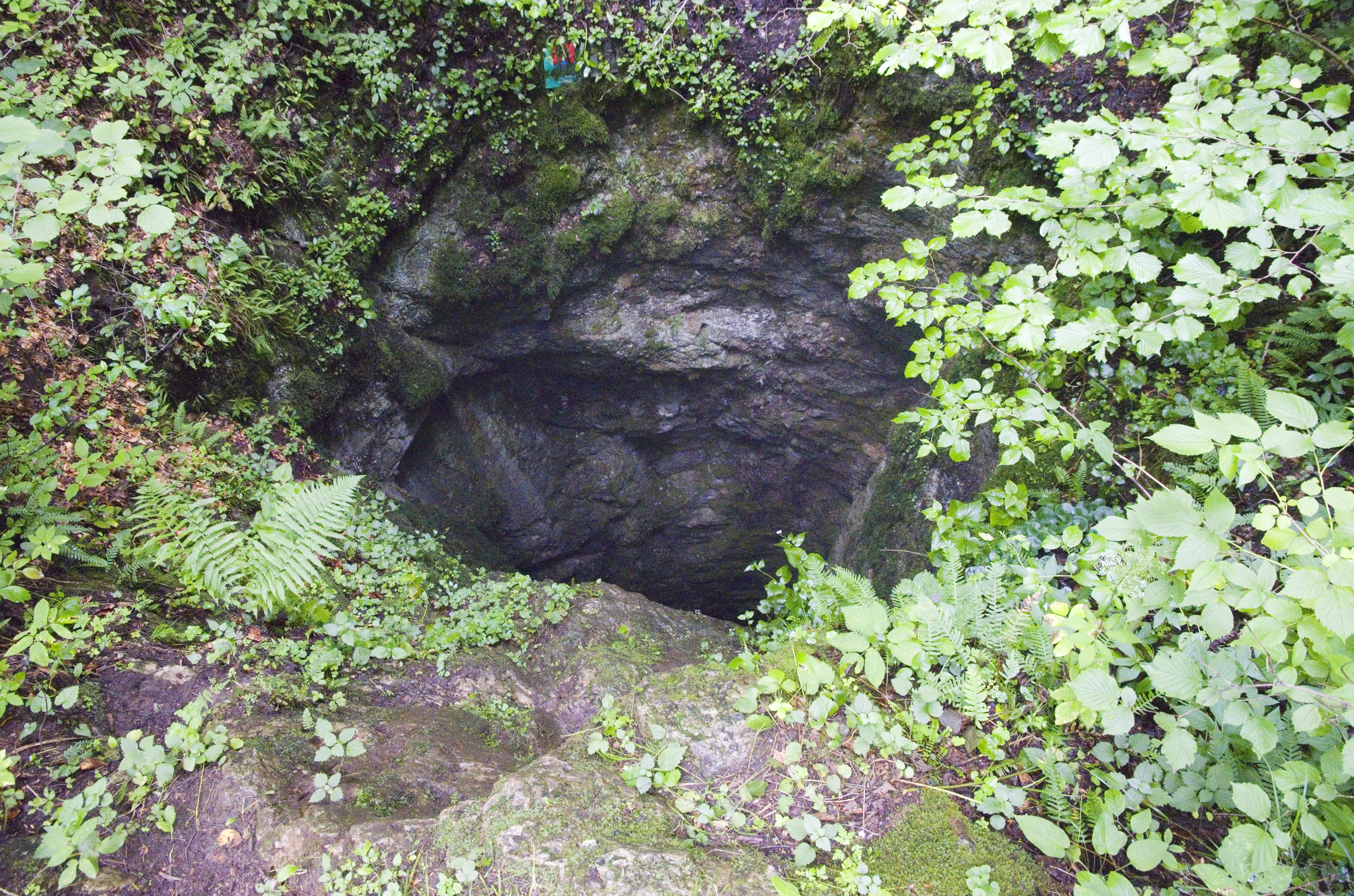 Vstup do propasti Zvonivá jáma na Plešivecké planině, NP Slovenský kras.